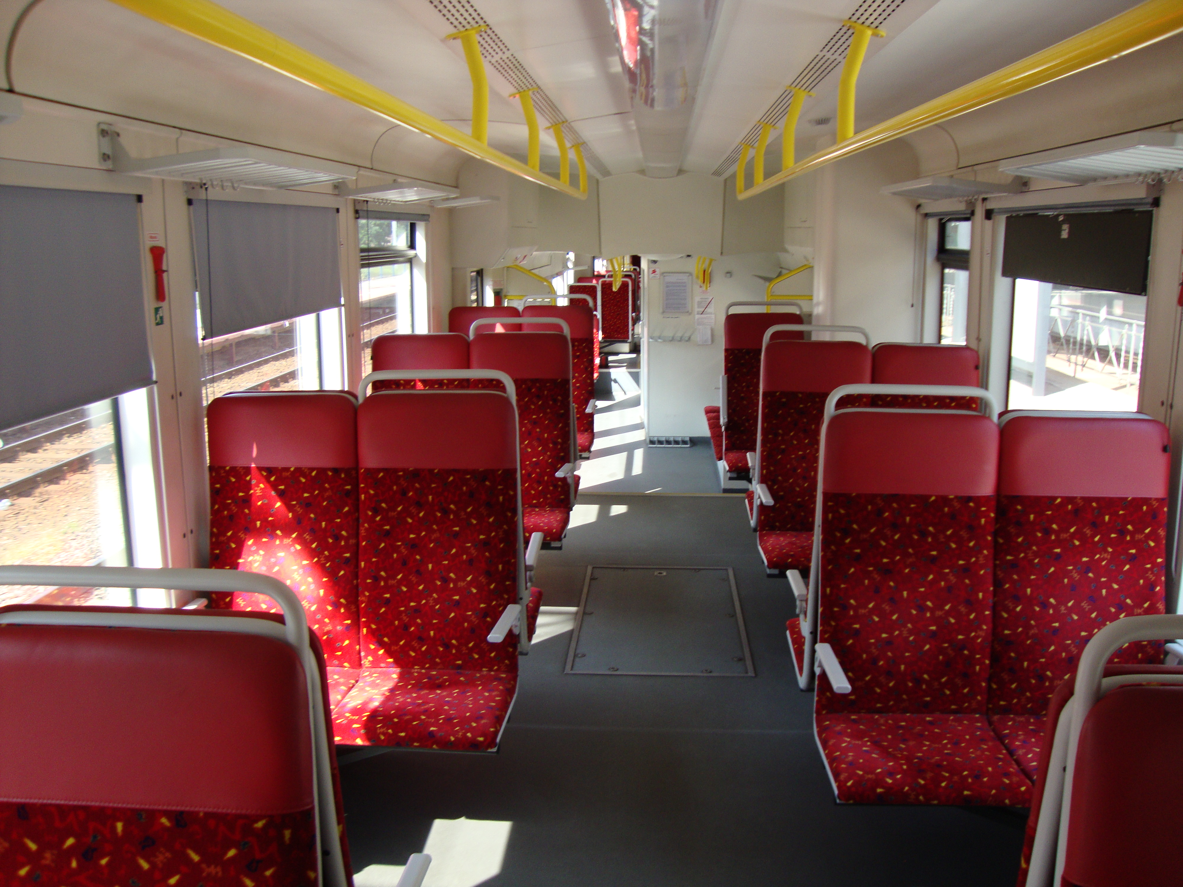 wnętrze SZT 218Md Mińsk 2